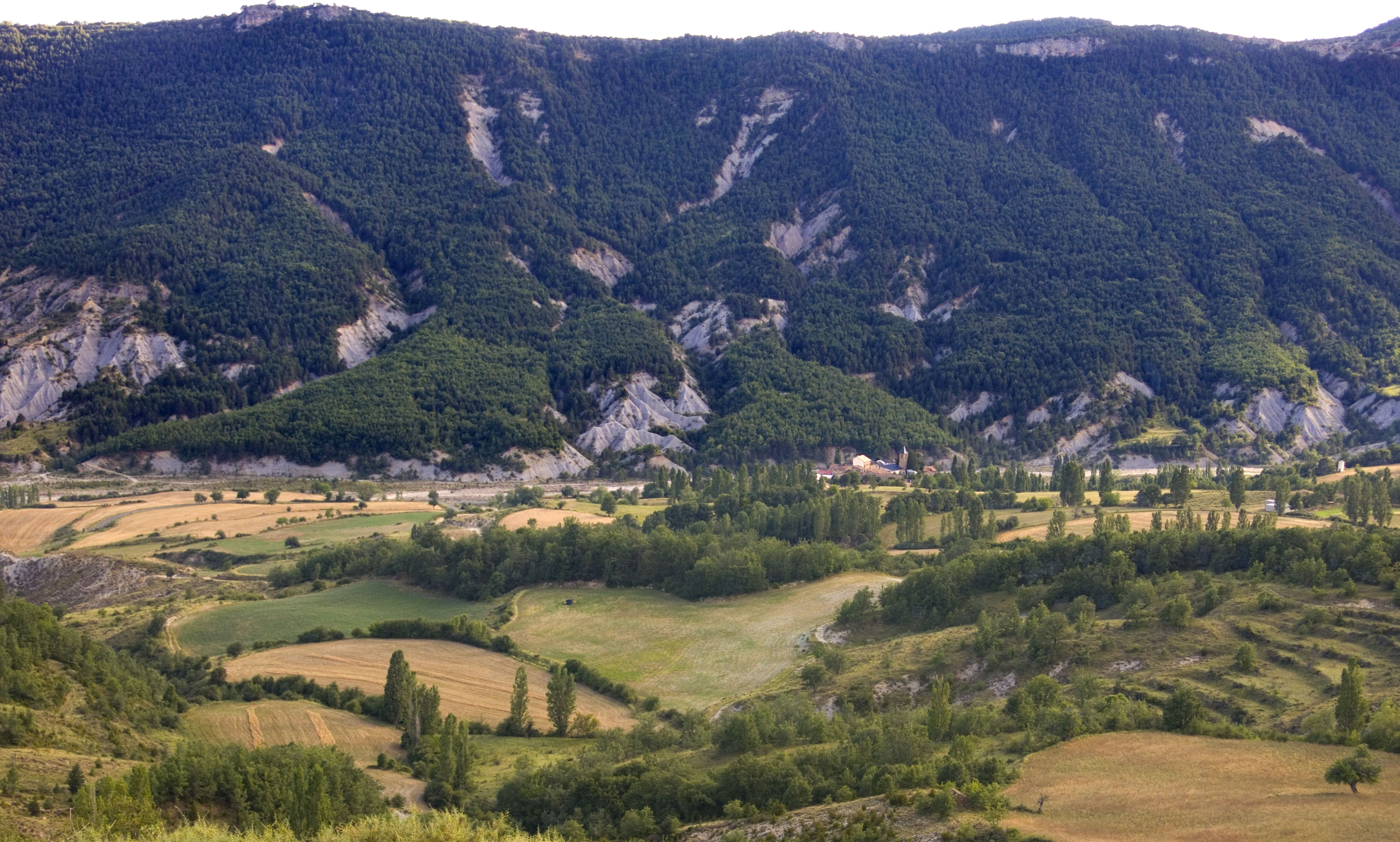 Municipi de Tor-la-ribera. A la imatge apareix la serra del Jordal amb la Penya de Rin de la Carrasca a l'esquerra, el riu de Vilacarle i el poble de Vilacarle amb les seues terres. (Baixa Ribagorça)